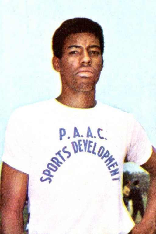 CAMPIONI DELLO SPORT 1969/70-n. 21 - L. JAMES (USA) - ATLETICA L.